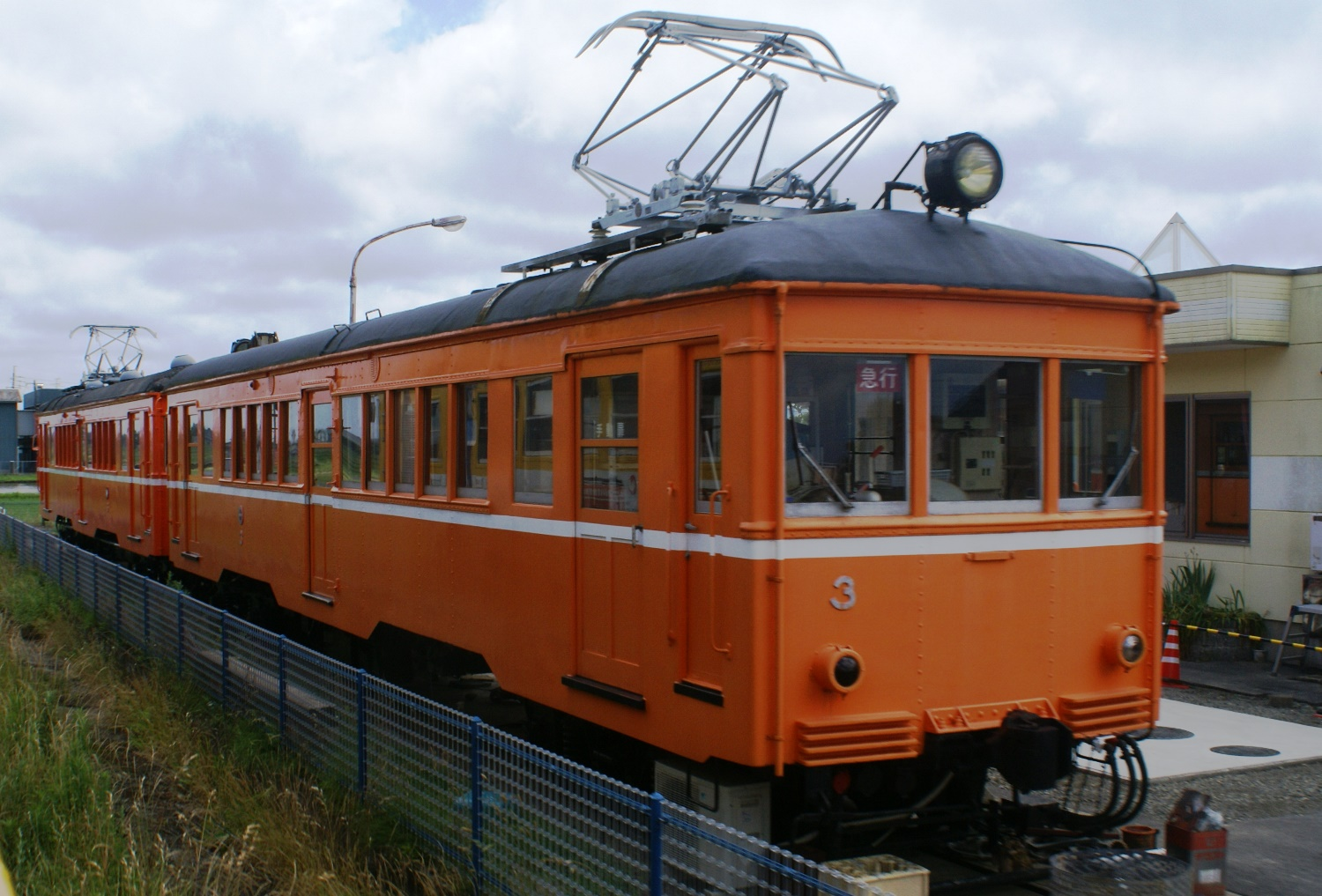 さとがた保育園に保存されているデハ3